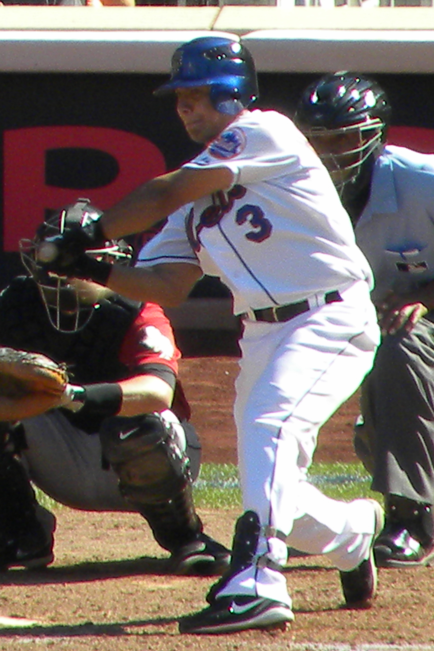 Luis Hernández